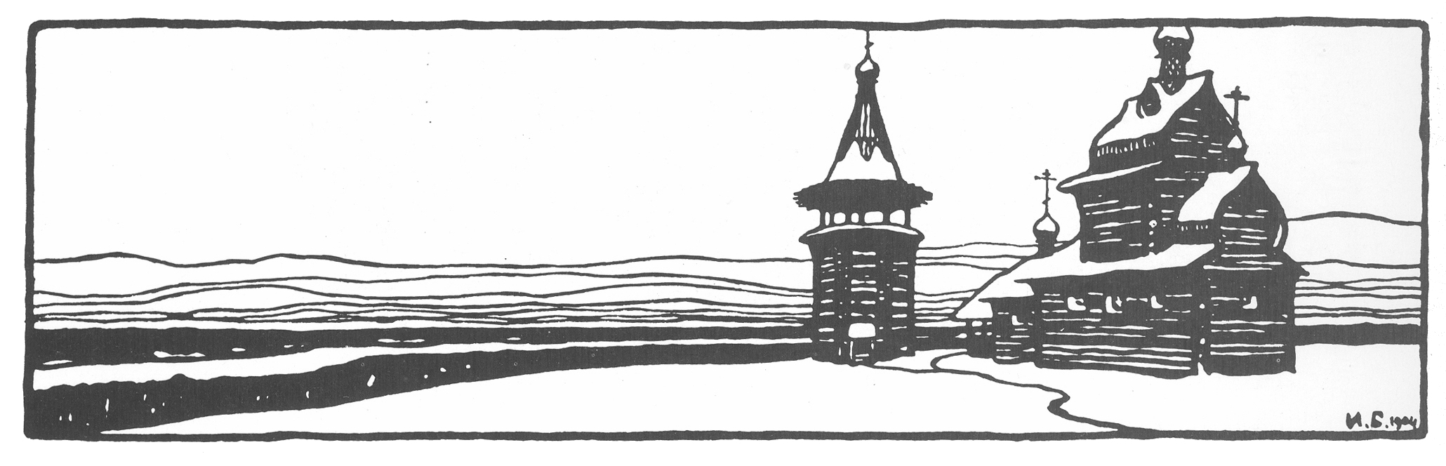 Заставка к статье Билибина «Народное творчество русского Севера» для журнала «Мир искусства».